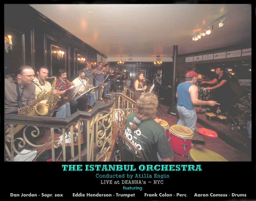 Atilla Engin arşivinden